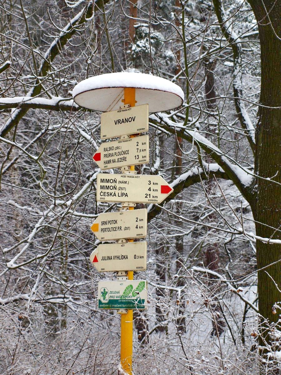 Vranov a Juliina vyhlídka